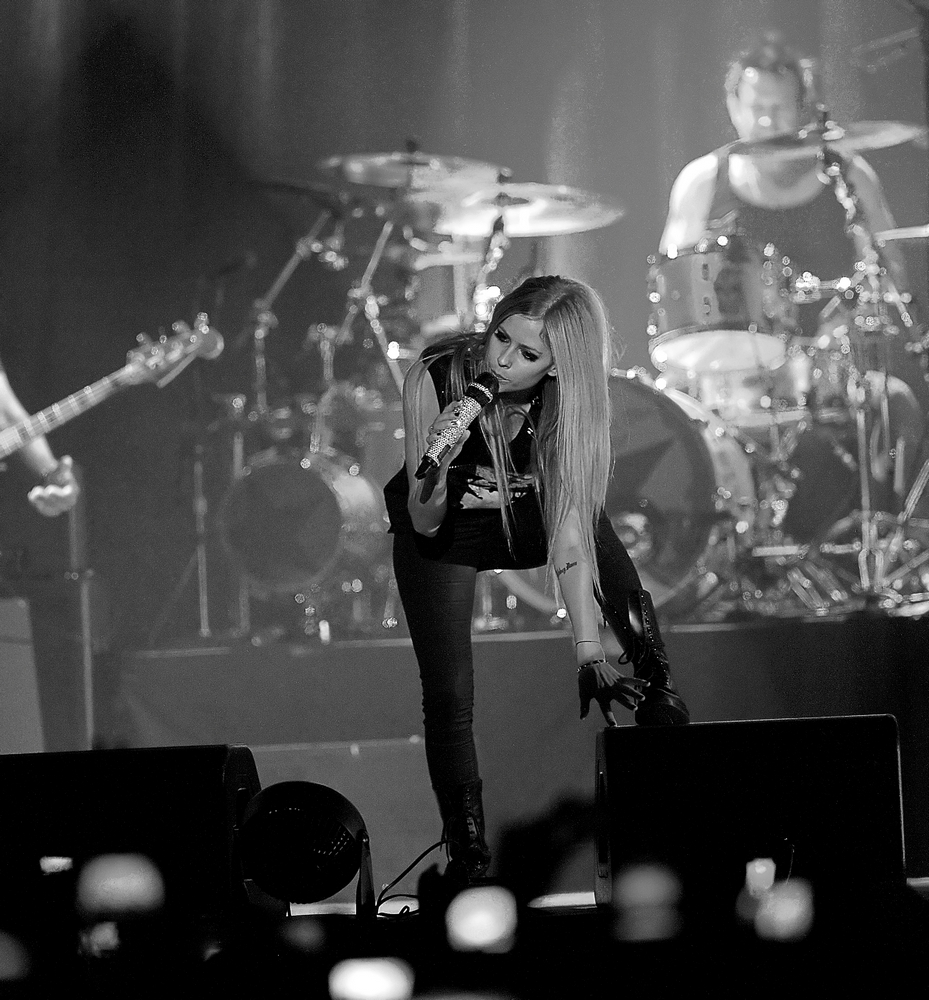 Avril Lavigne na Holanda em 2011